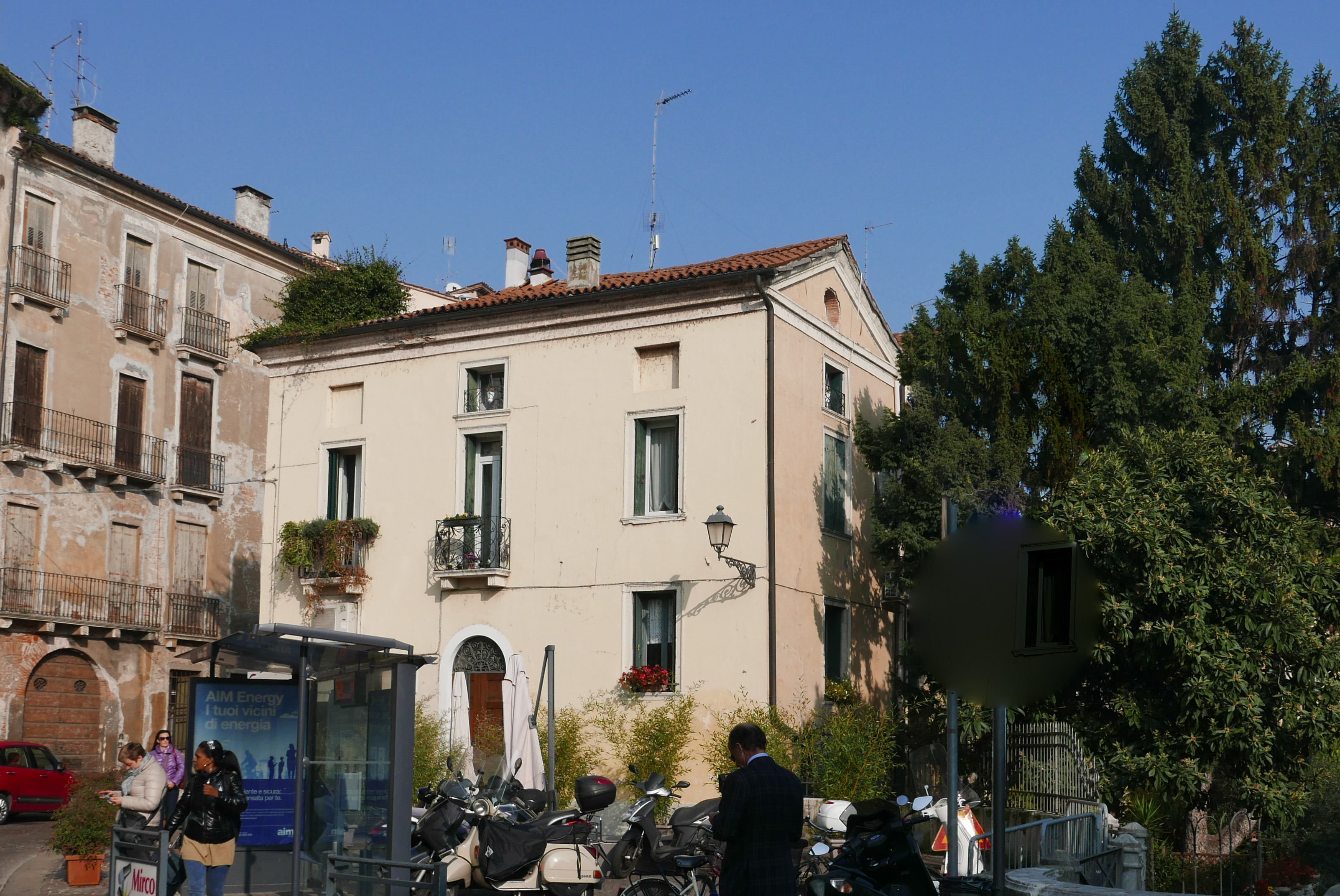 Edificio derivante dalla ristrutturazione dell'ex chiesa di San Paolo, presso ponte San Paolo